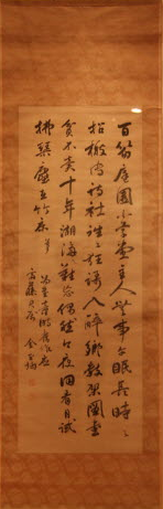 김옥균의 숙석읍산중